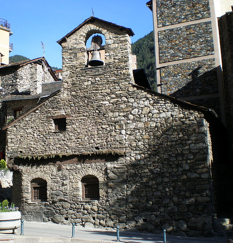 Església de Sant Miquel de la Mosquera